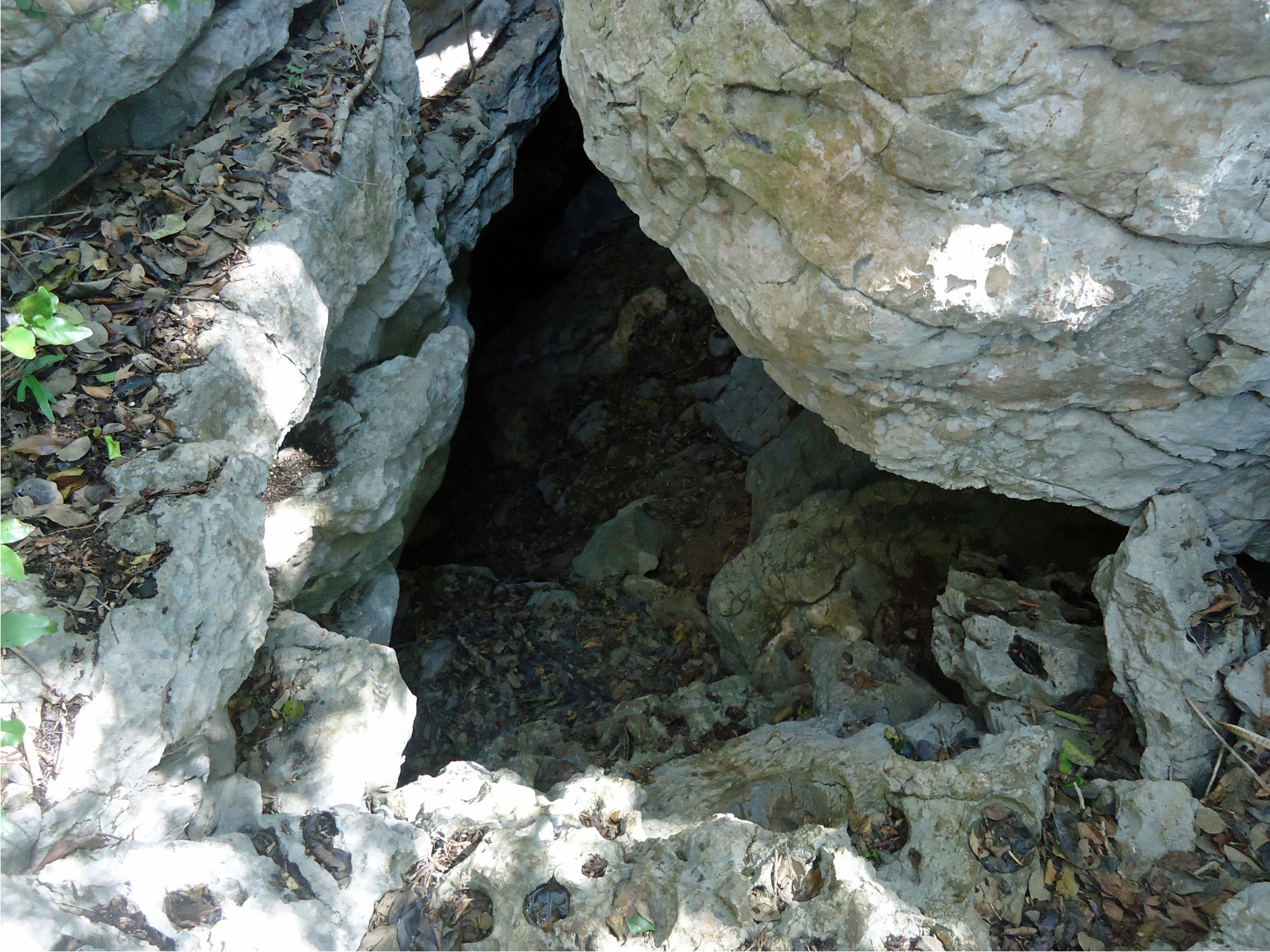 Cueva Cofresí